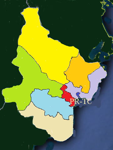 bản đồ